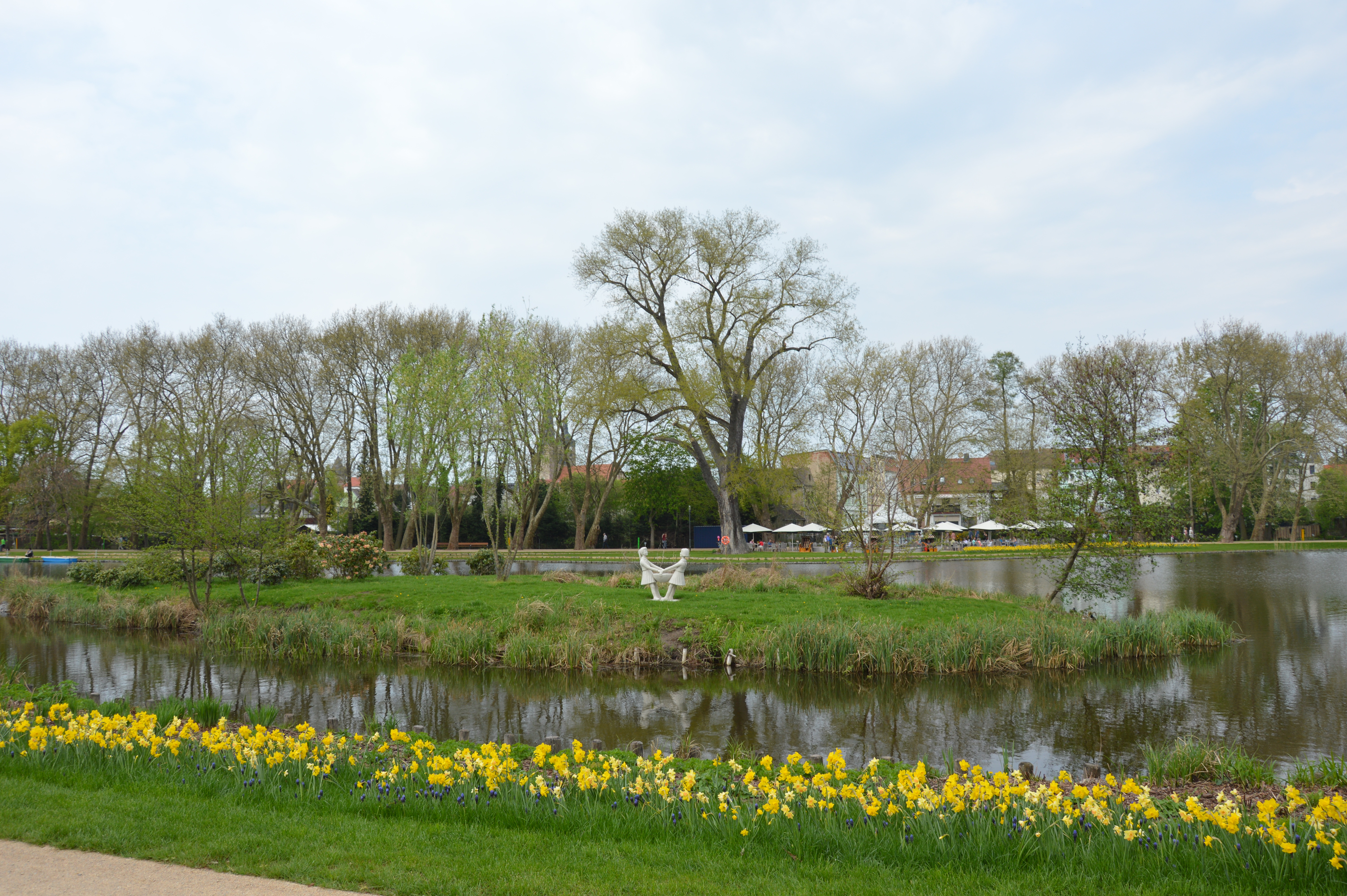 Flickschuhpark in Burg